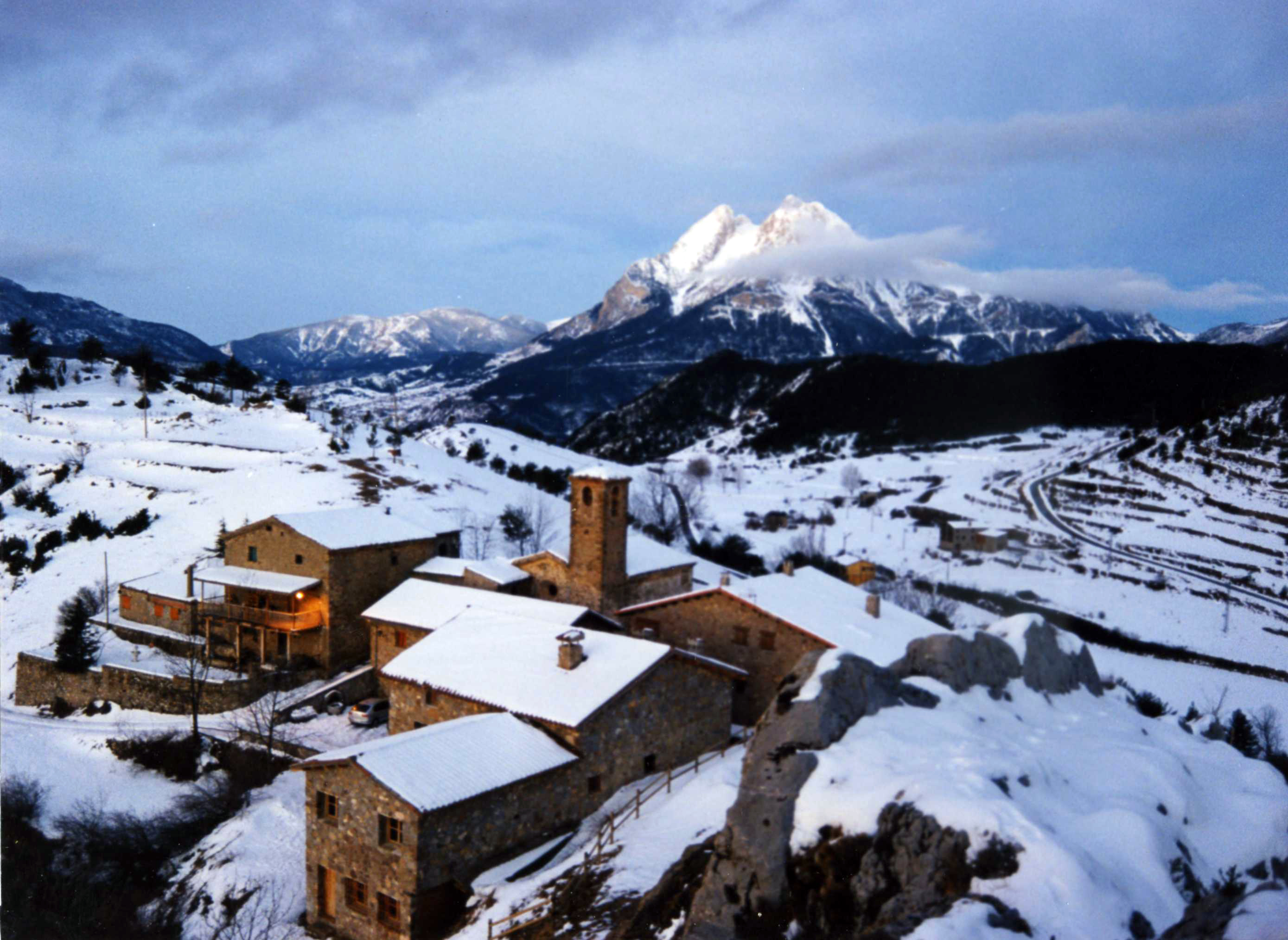 Gisclareny